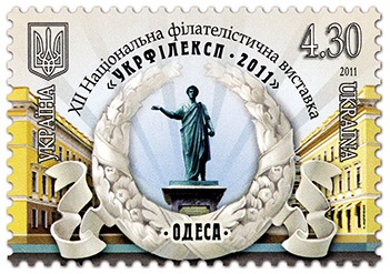 Художня поштова марка «ХІІ Національна філателістична виставка «Укрфілексп-2011». Одеса» (№ 1123). Формат марки – 40х28 мм. Перфорація гребінчаста – 14:14 1/4. Номінал марки – 4,30 грн. Кількість марок в аркуші – 16 (4х4). Тираж – 220 000 примірників. Дизайн марки та штемпеля – Наталії Андрійченко. Захист – мікротекст "Н. Андрійченко". В УФ променях світиться картуш. Марка – багатоколірна; спосіб друку – офсет. На полях аркуша надруковано штриховий код 4823027131559. Зам. 1-3379. 29.07.2011. Марку надруковано на ДП "Поліграфічний комбінат "Україна" по виготовленню цінних паперів".